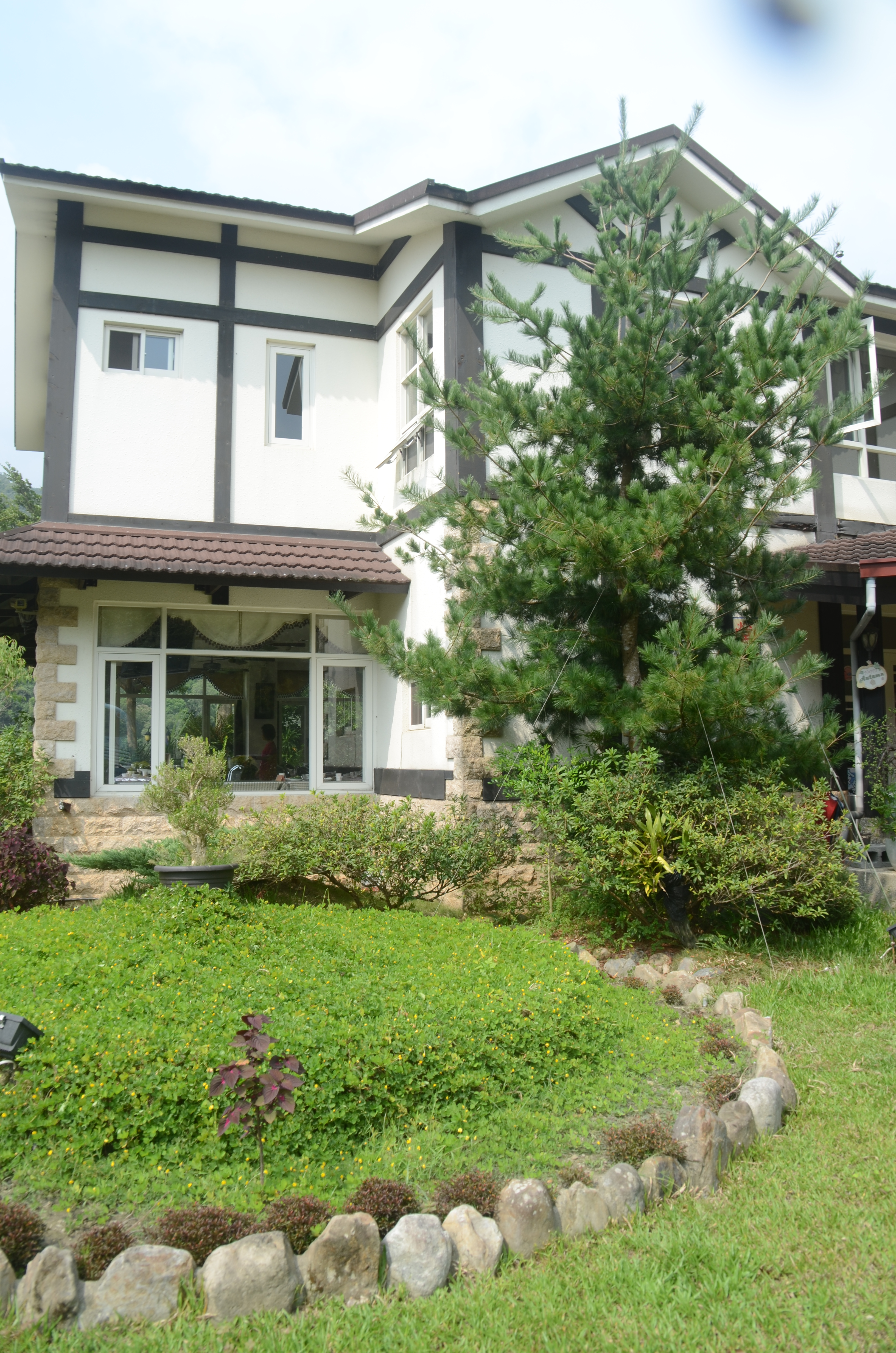 中文（台灣）: 霧社事件餘生紀念館用以紀念霧社事件的始末，與紀錄先民的遷徙歷史，於921後興建完成。